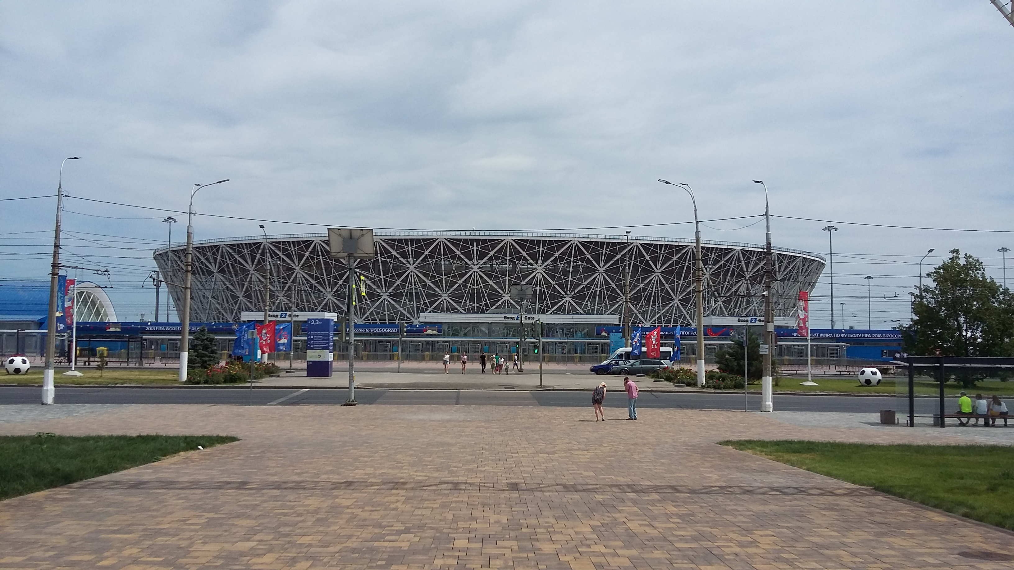 Волгоград Арена 24 июня 2018